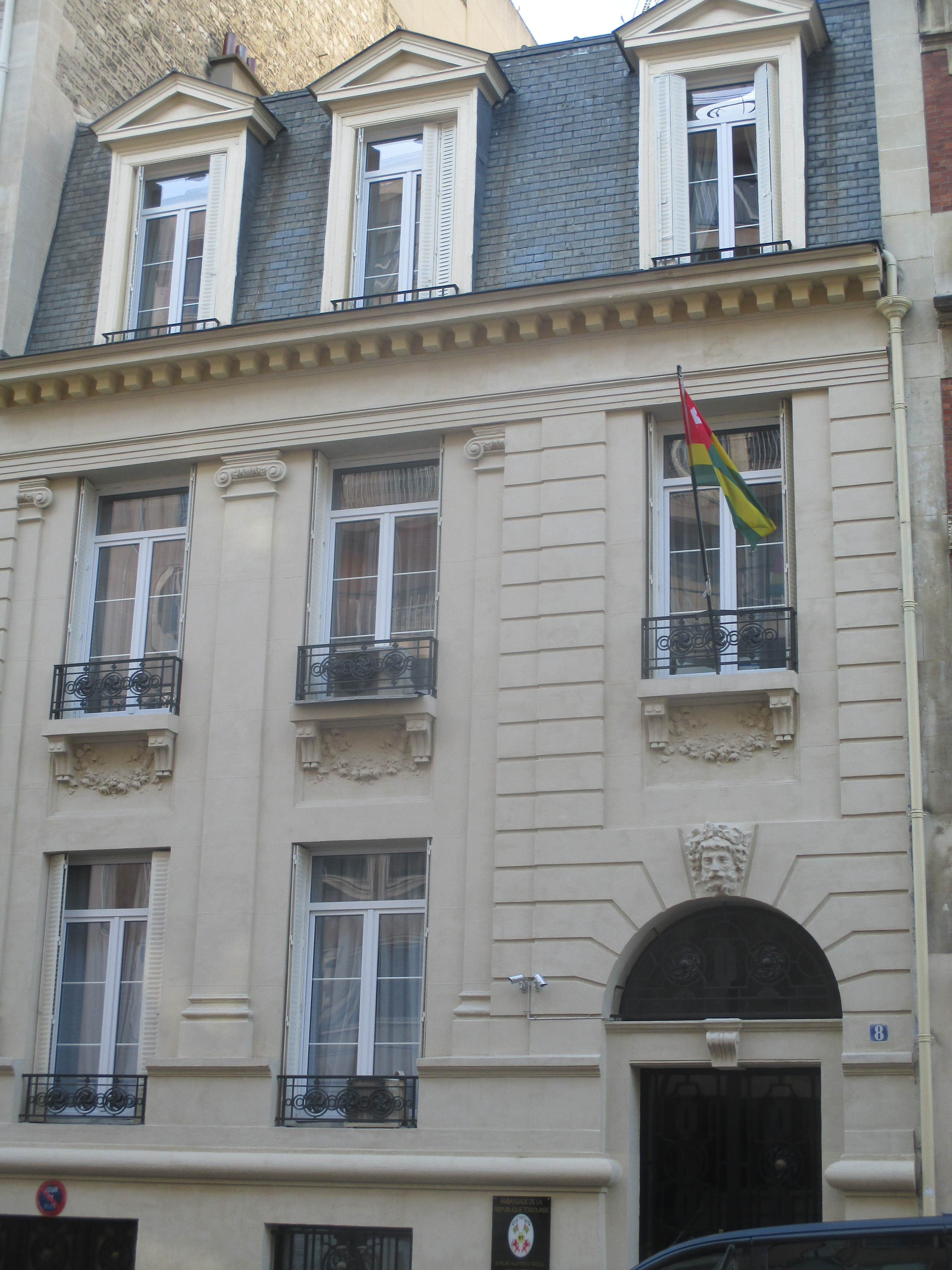 Ambassade du Togo à Paris, 8 rue Alfred Roll.